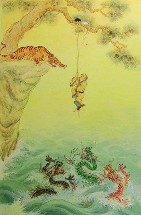 中文（香港）: 攀藤食蜜圖